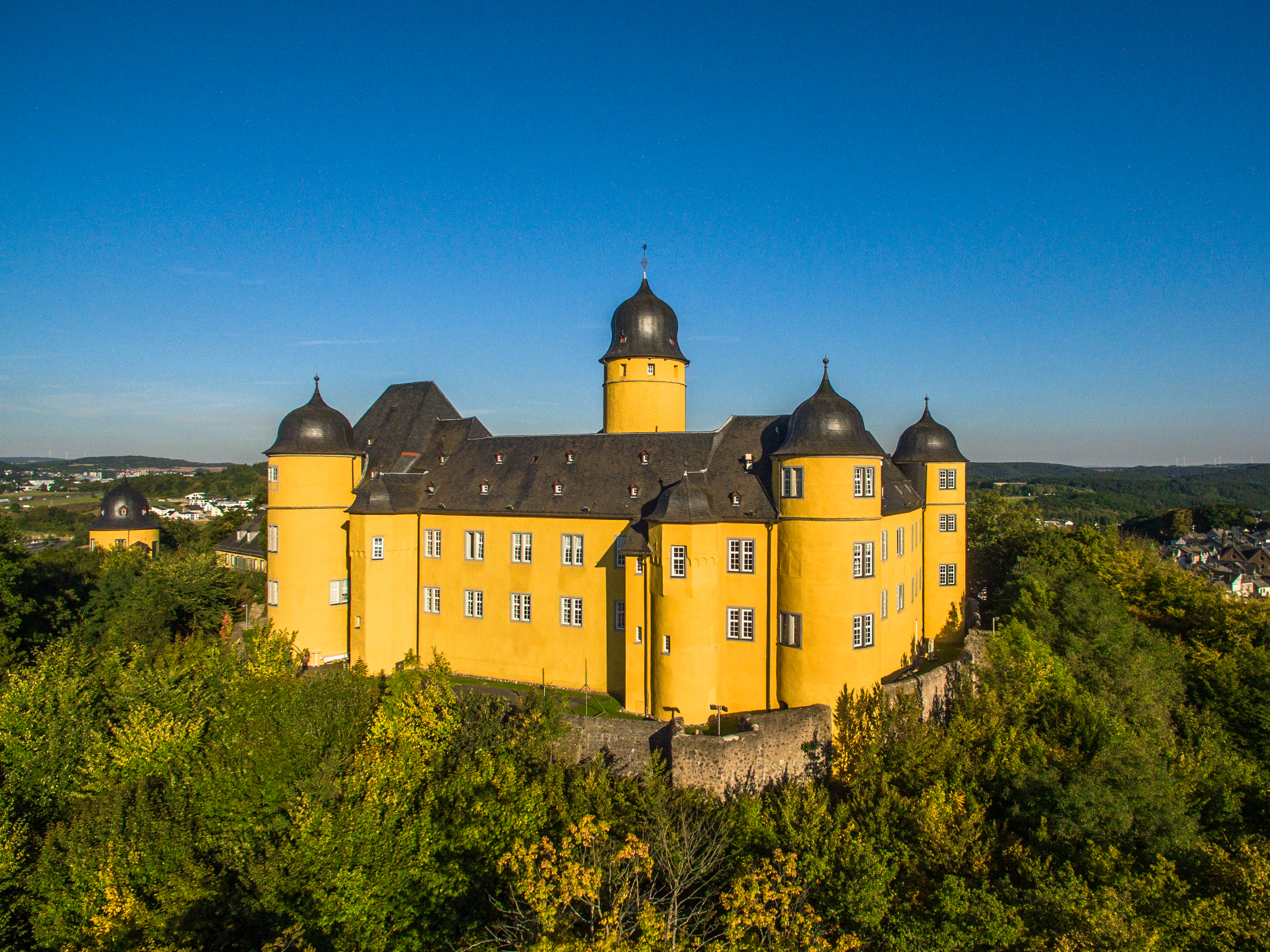 Luftbildaufnahme Schloss Montabaur